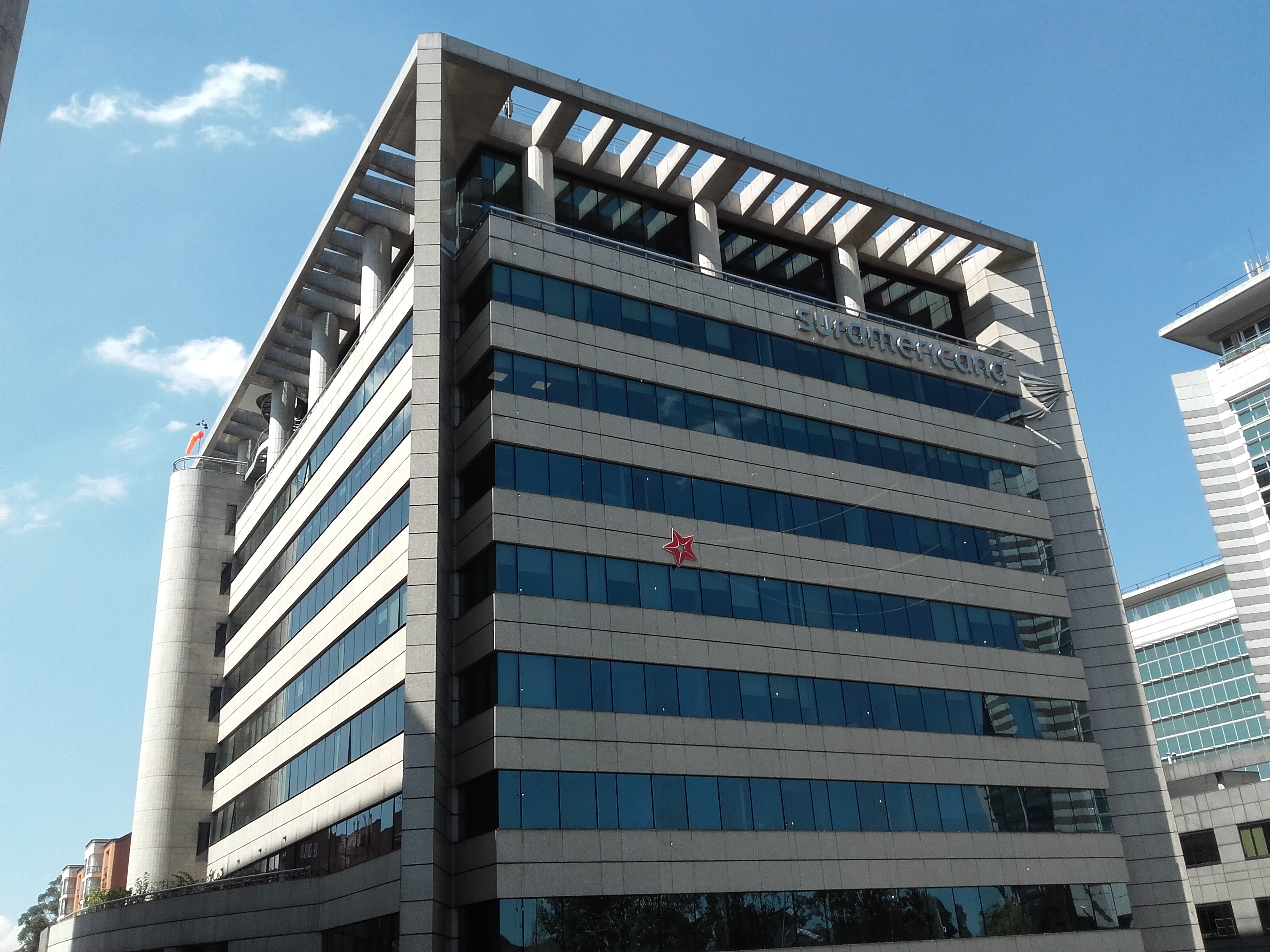 dnndndnfkfkfnfn